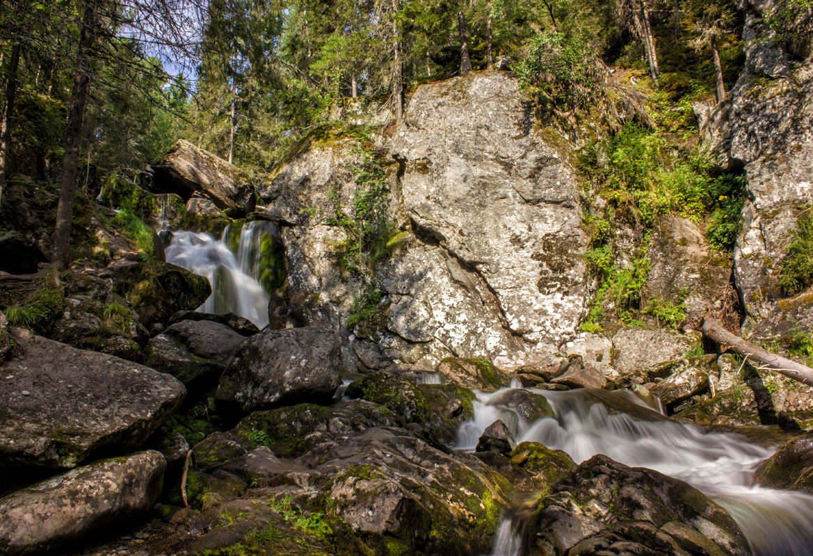 Жигаланские водопады: Красновишерский район, Пермский край This image is related to the protected area of Russia number 5910190